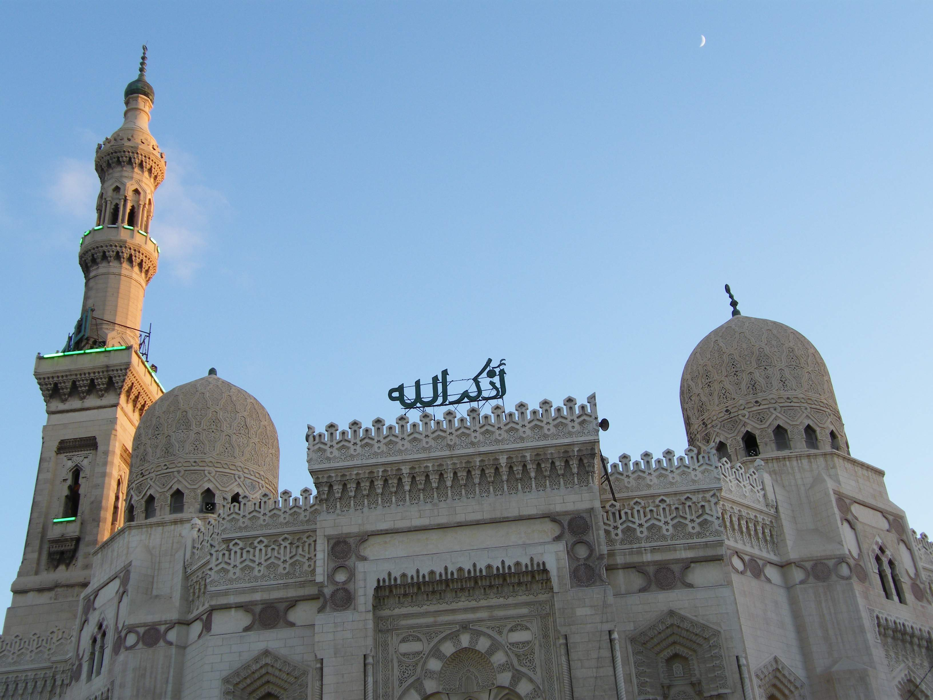 la mosquee Abo El-Abaas